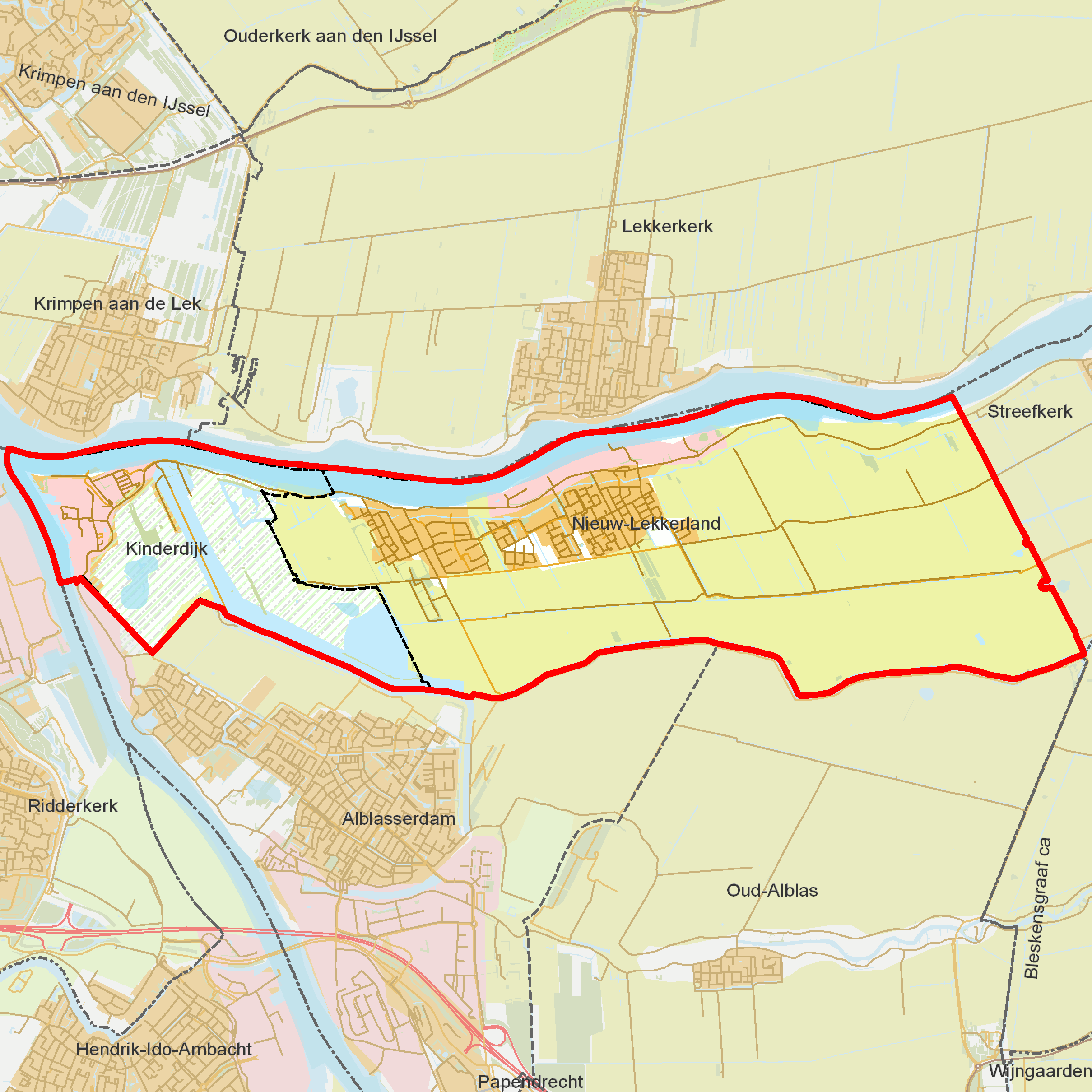 BAG woonplaatsen - Gemeente Nieuw-Lekkerland.png